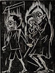 Hans Rilke Auf der Flucht 1910 Holzschnitt